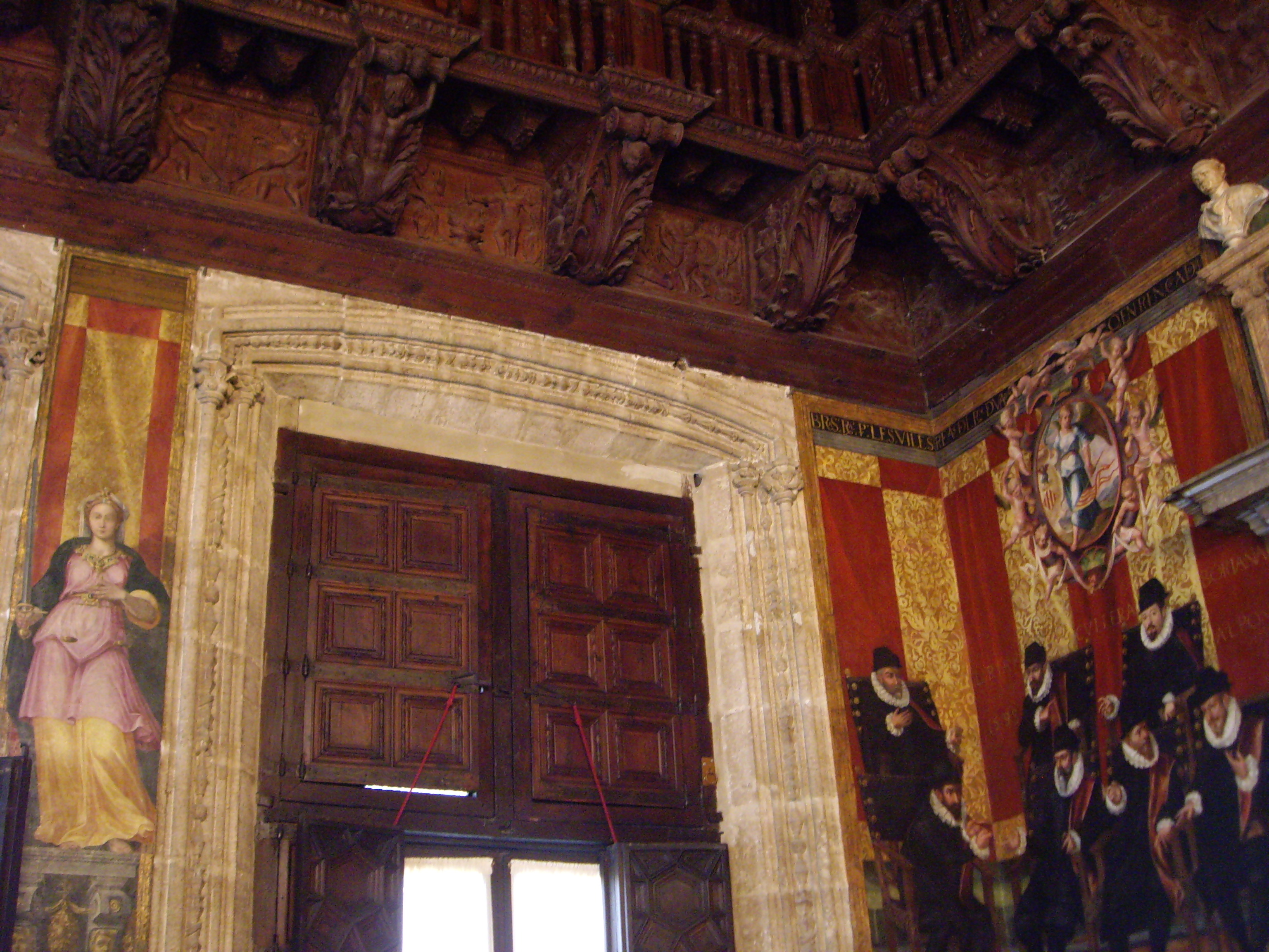 Justícia.